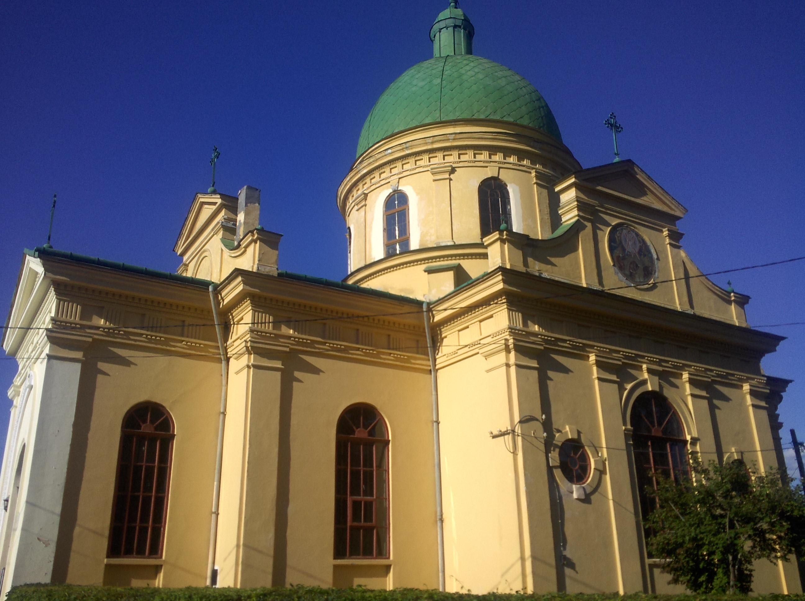 Esglesia Schimbarea la Faţă de Roman, Romania, ubicada en el cementeri Eternitatea